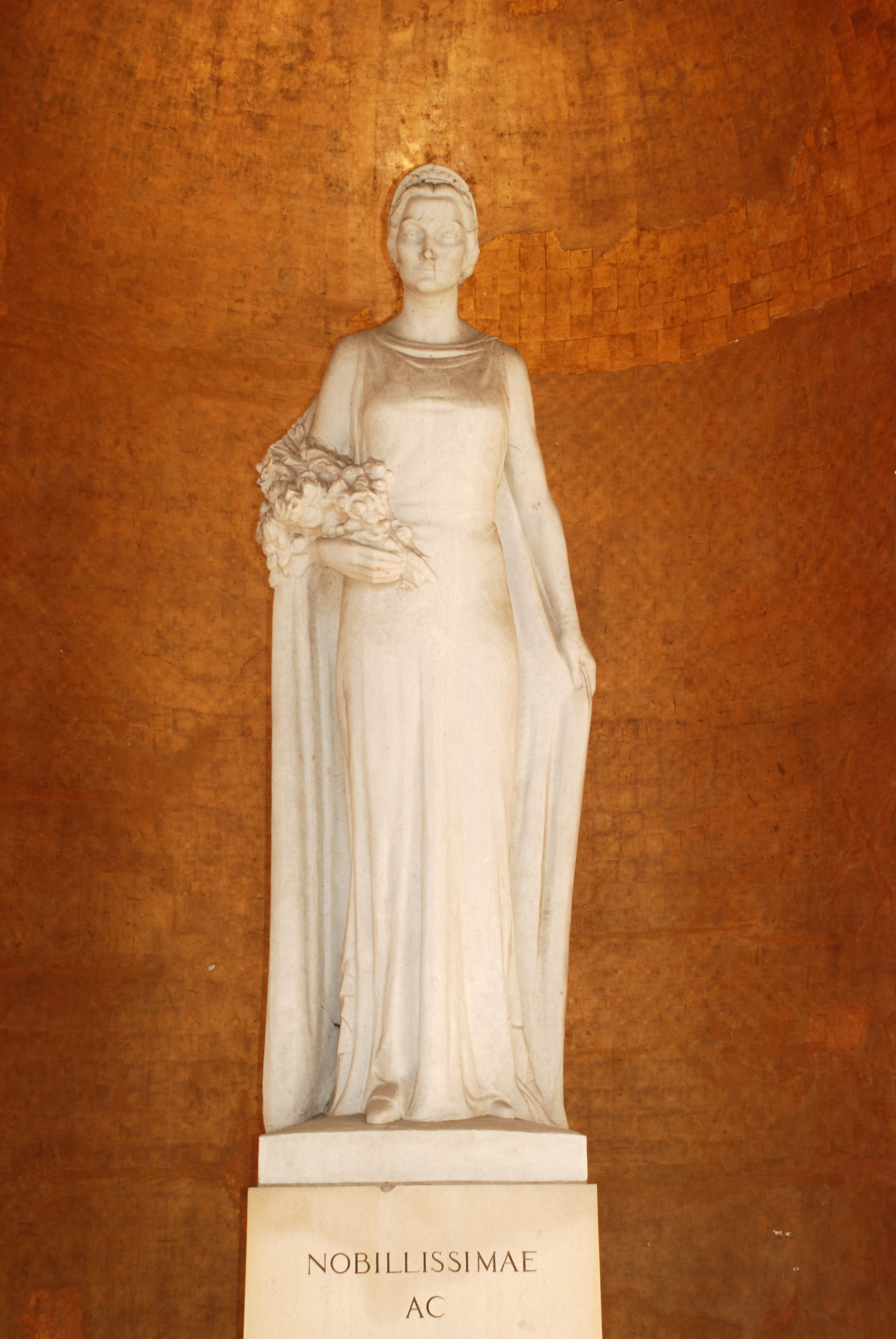 Belgique - Bruxelles - Mémorial Reine Astrid (Architecture monumentale - architecte Paul Bonduelle - 1938)